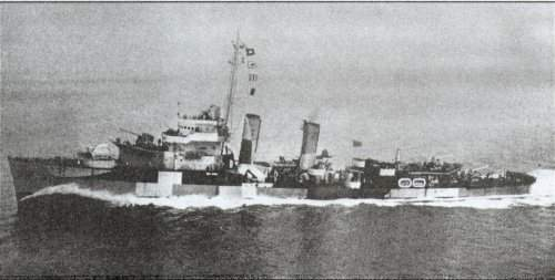 Destróier D24 Greenhalgh em 1944